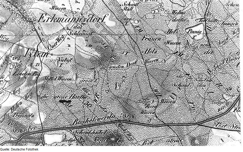 Original image description from the Deutsche Fotothek Arnsdorf-Reinhardswalde (Wüstung). Oberreit, Sect. Dresden, 1821/22